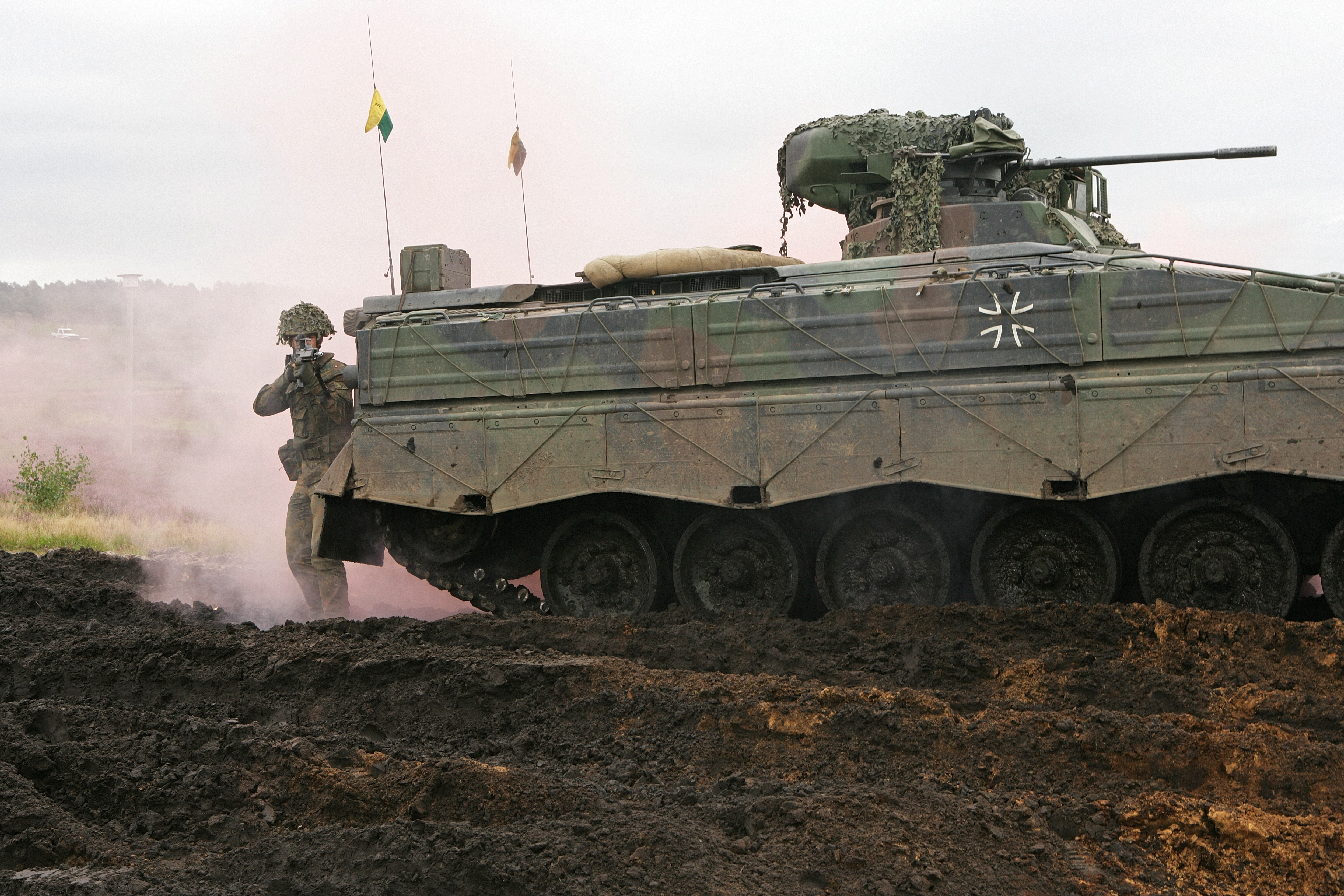 Panzergrenadiere nach dem Wechsel der Kampfweise. Nach dem Verlassen des Schützenpanzer Marder 1A3 nehmen sie Deckung hinter dem Fahrzeug. Die Panzerlehrbrigade 9 stellt vom 4. bis 10. September die Fähigkeiten des deutschen Heeres auf dem Truppenübungsplätzen Munster und Bergen vor. Unterstützt wird die Lehrbrigade dabei vom Ausbildungszentrum Munster. In diesem Jahr wird das heutige und zukünftige Aufgabenspektrum des deutschen Heeres in dieser Lehrübung dargestellt. Die Informationslehrübung richtet sich in erster Linie an den Führernachwuchs der Bundeswehr, der Offizierschule des Heeres und Soldaten ausländischer Streitkräfte. ©Bundeswehr/Mandt